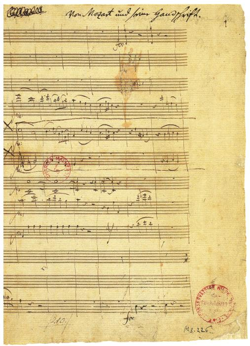 Klavierkonzert A-dur KV 488. Faksimile nach dem Autograph Ms. 226 im Besitz der Bibliothèque Nationale de France, Paris.